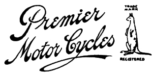 Premier motorcycles logo.